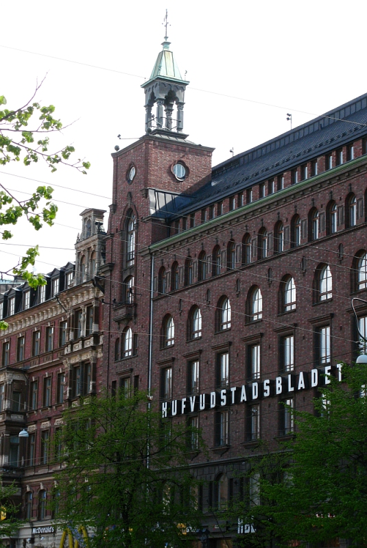 Hufvudstadsbladetin toimitalo Mannerheimintiellä Helsingissä.